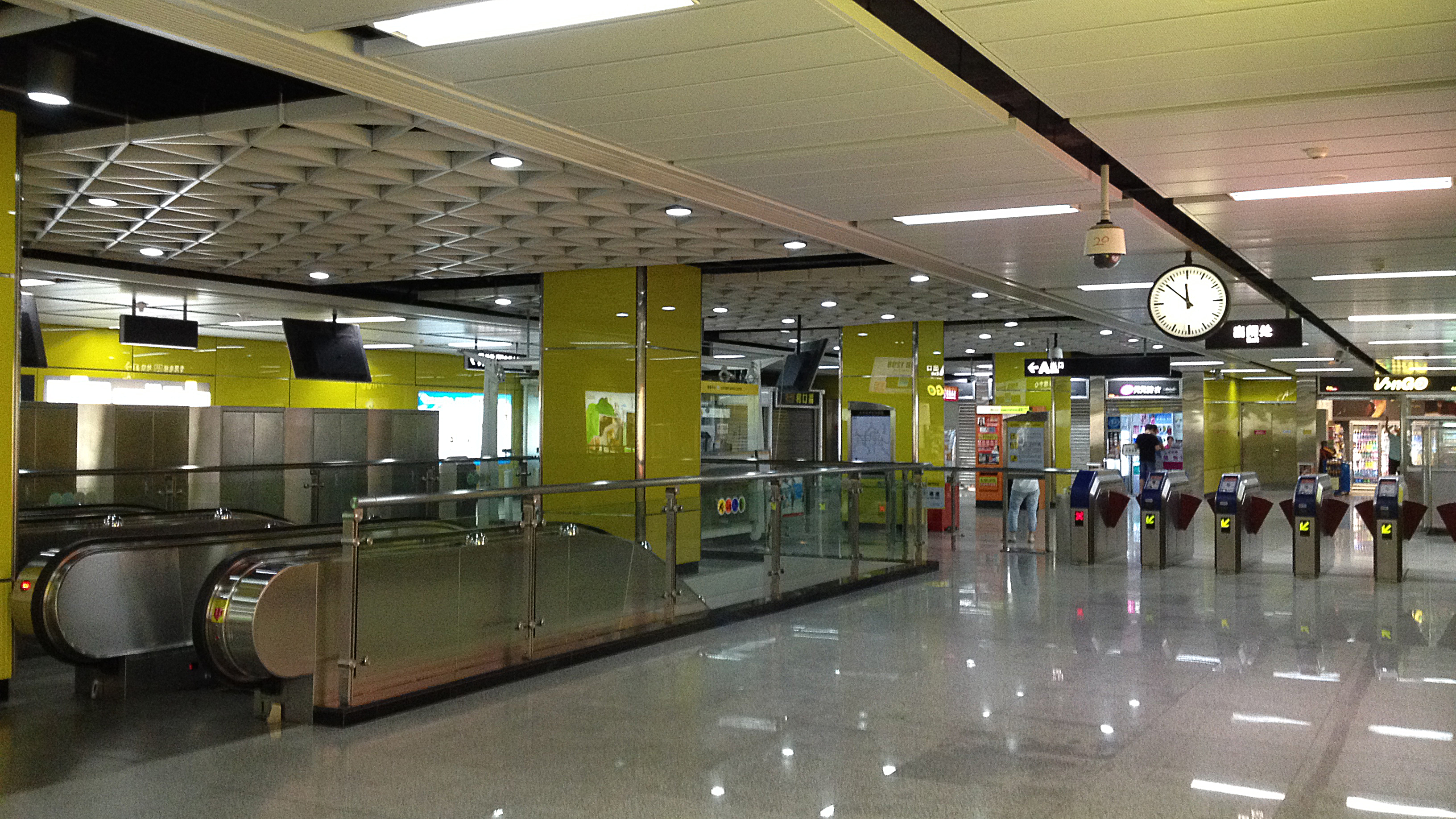 广州地铁员村站站厅